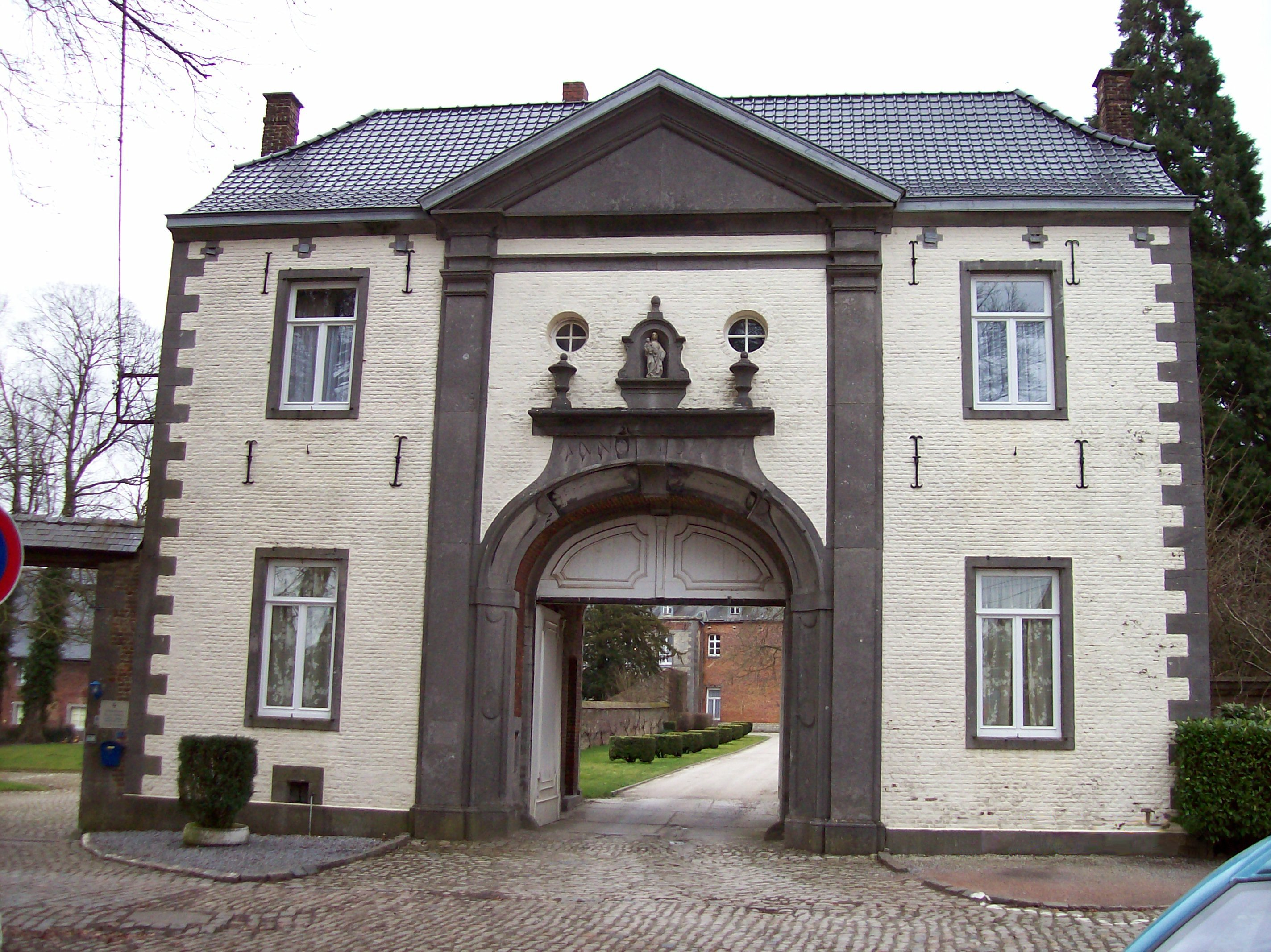 Portail du prieuré de Bois-Seigneur-Isaac (Ville de Braine l'Alleud, Belgique)